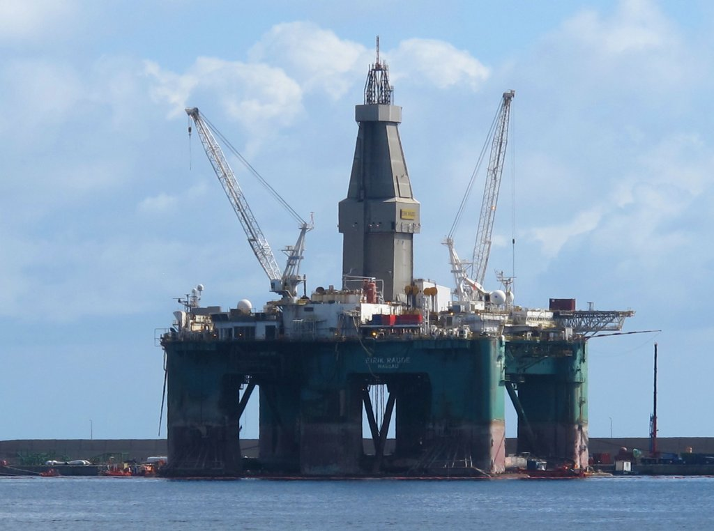 La Plataforma petrolifera "Eirik Raude" en el muelle Reina Sofía del puerto de La Luz y Las Palmas de Gran Canaria. Una de las plataformas petrolíferas flotante más grande del mundo, "Eirik Raude",llegó el pasado lunes al puerto de Las Palmas de Gran Canaria, donde permanecerá unos dos meses para una revisión y puesta a punto general. Esta plataforma pesa más de 37.000 toneladas, mide casi 120 metros de alto por 110 de eslora y 80 de manga y su magnitud obligó a una maniobra de atraque de casi dos días, en el dique Reina Sofía, lugar donde permanecerá hasta su marcha. Su propietaria es la empresa Ocean Rig y está previsto que en su reparación intervengan gran número de empresas del puerto de Las Palmas de Gran Canaria. Eirik Raude se completó en 2002 como una unidad de perforación de quinta generación semi-sumergible construido para el Bingo 9000 de diseño. El casco fue construido en el astillero de Dalian en China, con equipamiento en los EE.UU. por Friede Goldman costa afuera y en Canadá por Irving Astillero de Halifax. Este equipo está diseñado para llevar a cabo las operaciones de perforación en aguas profundas hasta 10 000 pies. Eirik Raude se mantiene estable en condiciones climáticas adversas debido a sus características de movimiento superiores y avanzados sistemas de posicionamiento dinámico. La plataforma está totalmente preparadas para el invierno durante todo el año para operaciones en zonas climáticas extremas, tales como costa afuera de Canadá (Nueva Escocia y Terranova) y en el mar del norte de Noruega (Barents Mar). Eirik Raude se ha actualizado recientemente con un sistema de amarre de 8 puntos. El equipo de perforación perforado 4 pozos en el Mar de Barents bajo extremas condiciones climáticas adversas. Fuente y más información : Fotografías : Ver el video